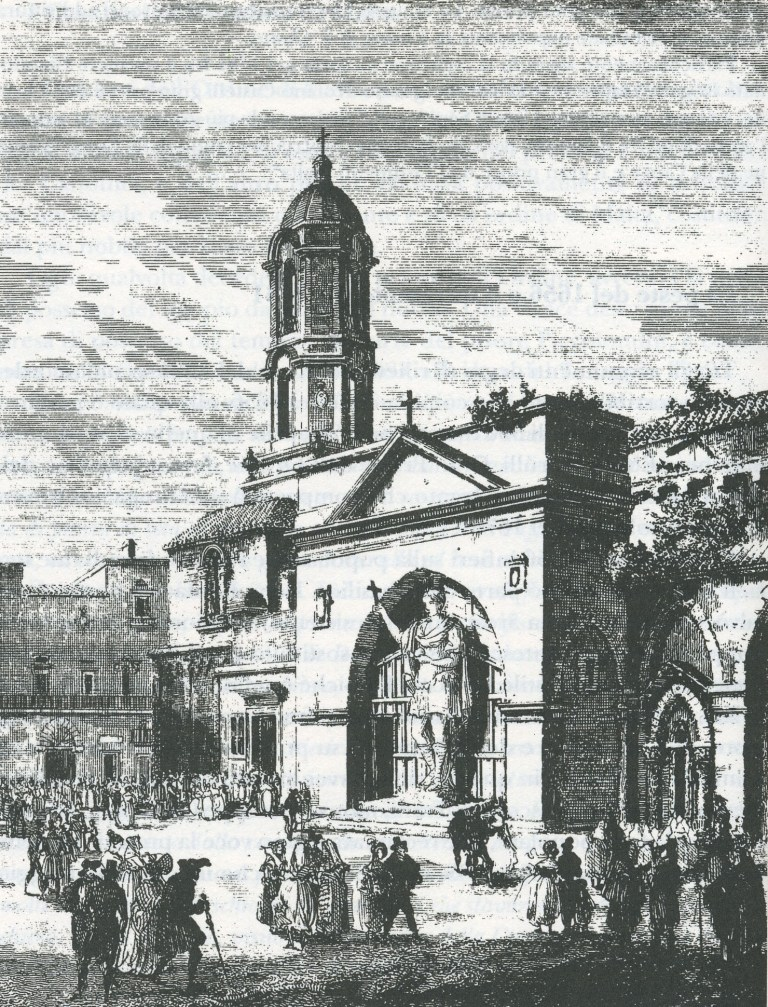 Stampa di fine '700 che rappresenta il Colosso di Barletta e la parte orientale della chiesa del Santo Sepolcro.